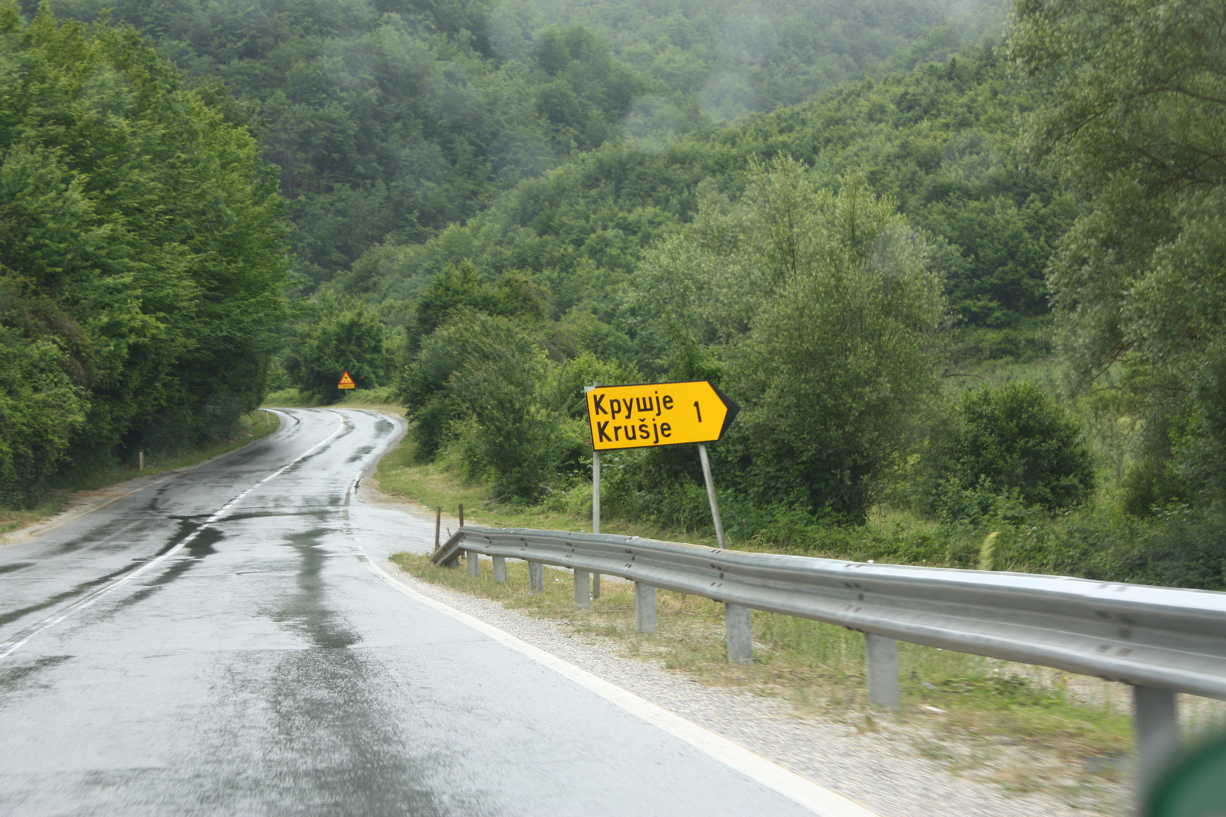 Krušje, Macedonia